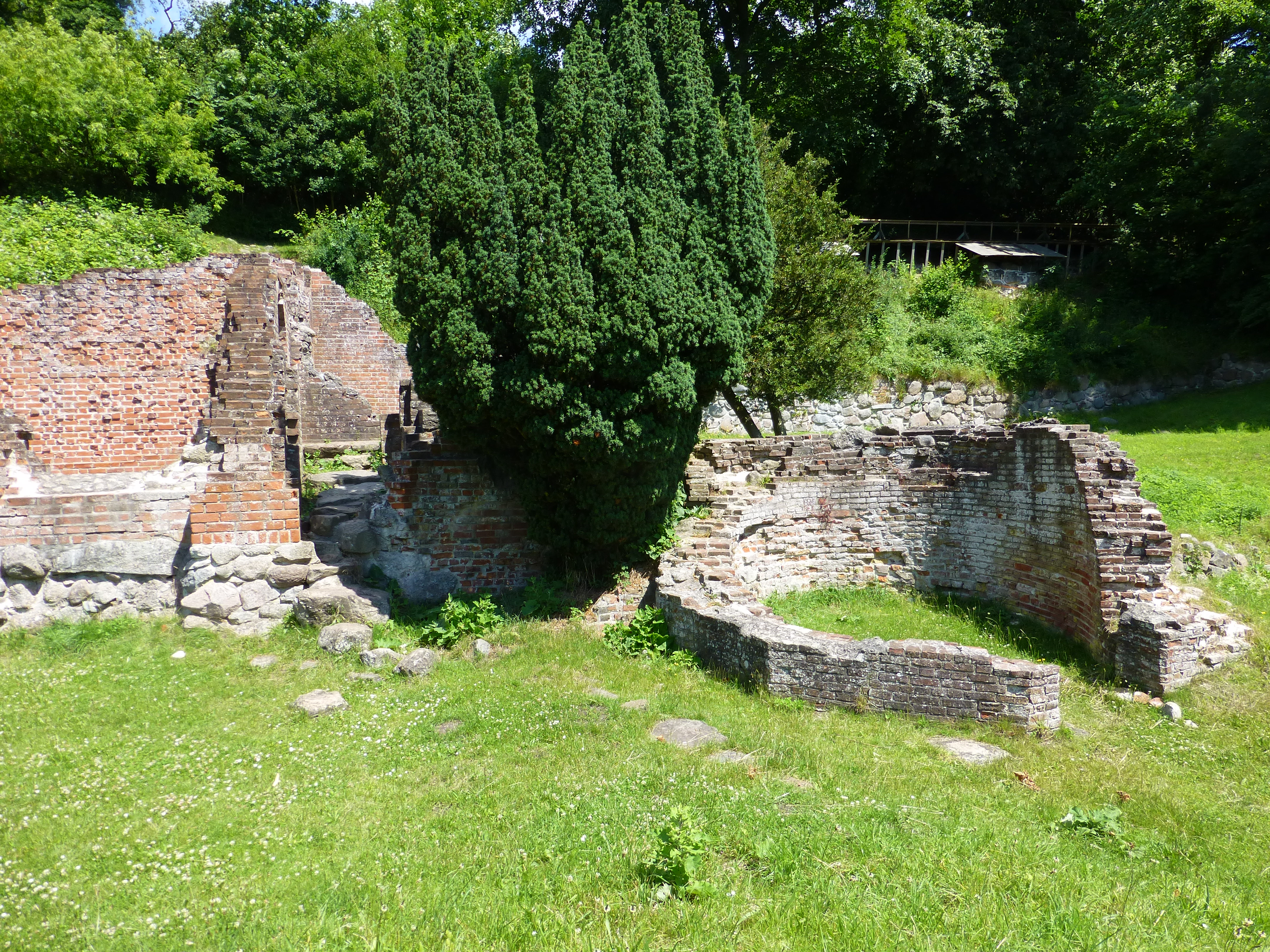 Ruinerne 2012